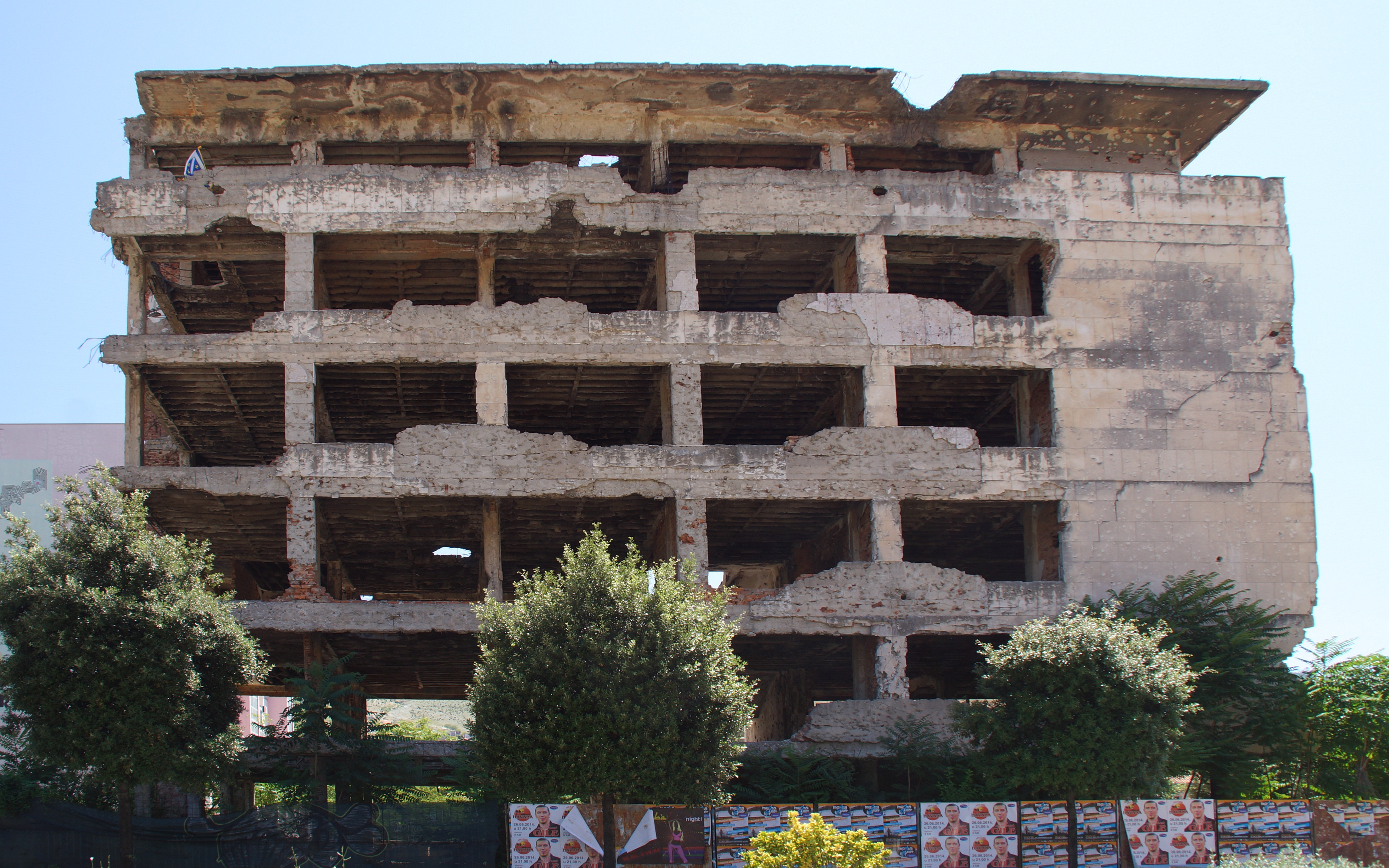 Kriegsschäden 1992-95 an einem Gebäude am Bulevar Hrvatskih branitelja in Mostar, Bosnien und Herzegowina - Foto Wolfgang Pehlemann IMG_8515